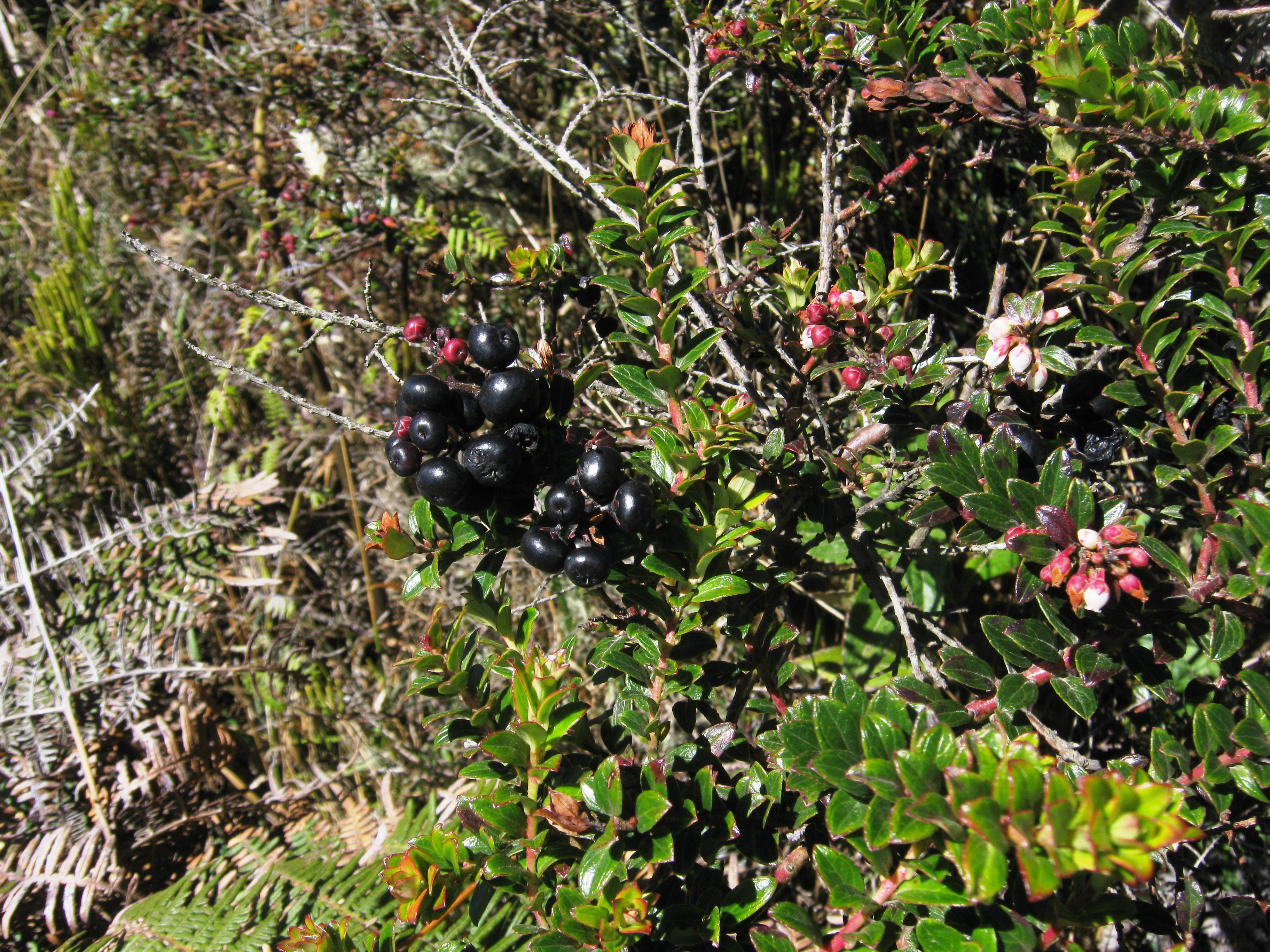 Fotos tomadas en trinidad, Dota